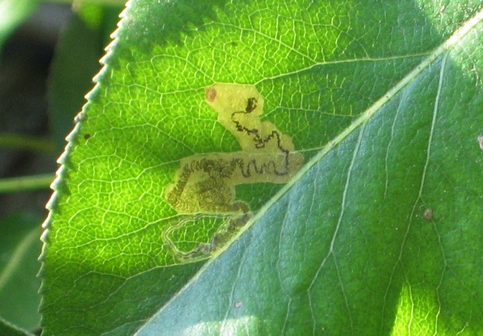 Mine von Stigmella pyri